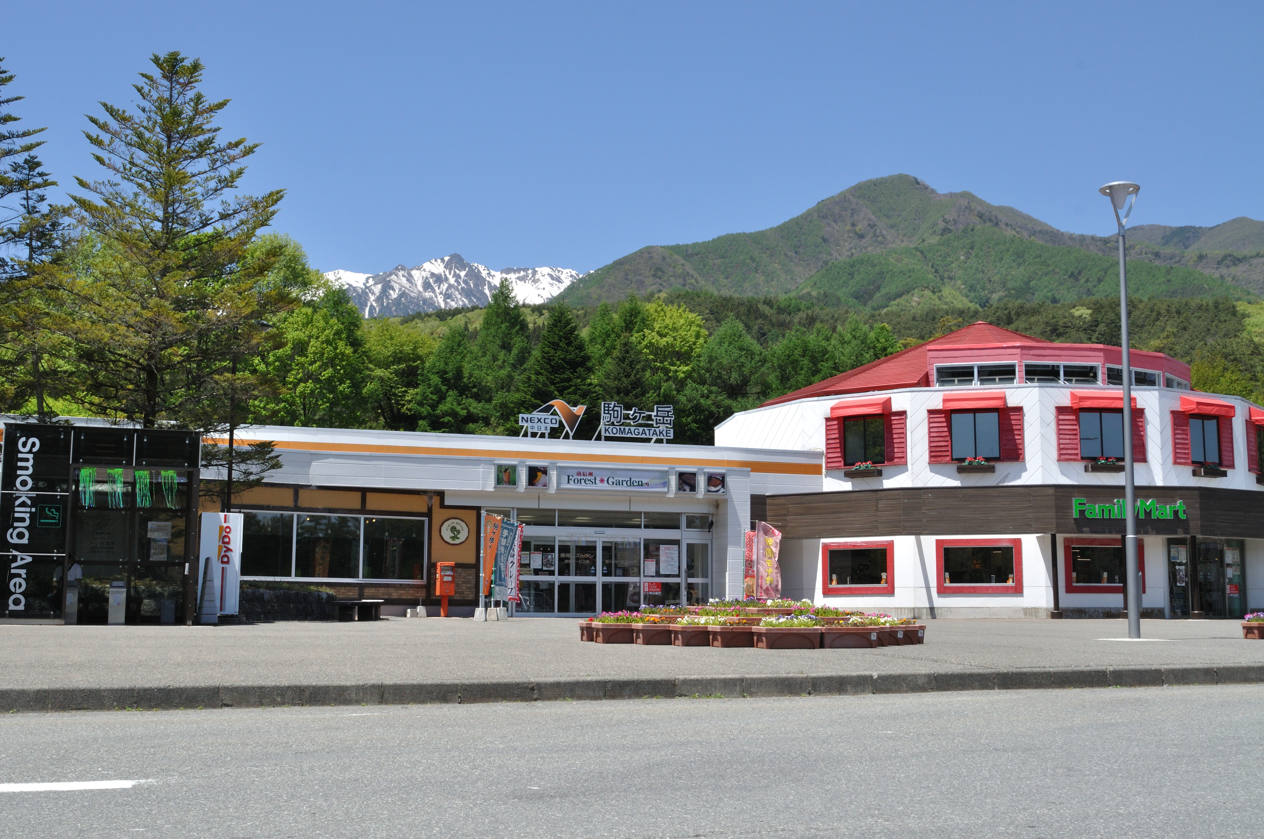 駒ヶ岳サービスエリア上り方面の参考画像